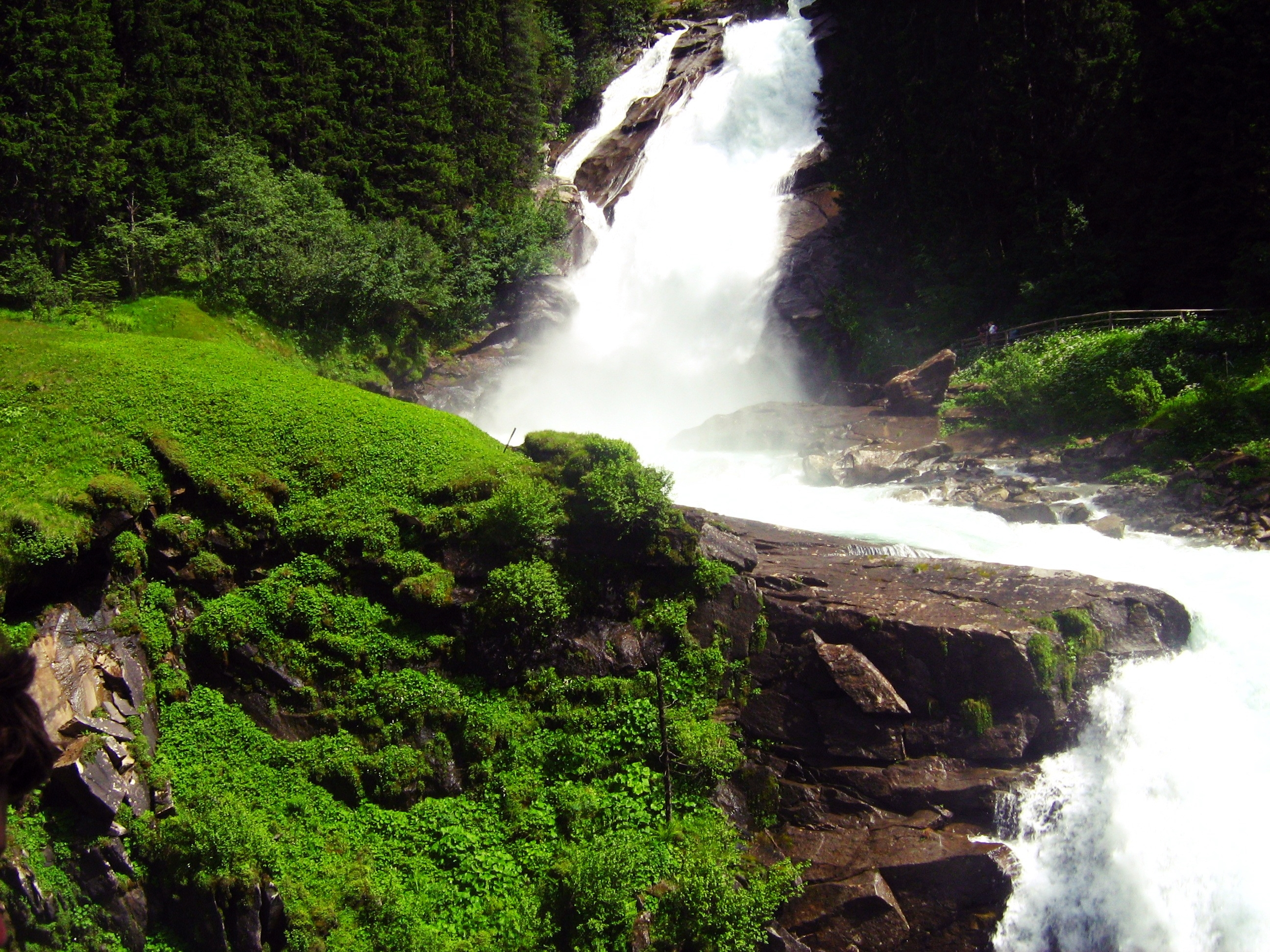 A krimmli vízesés Ausztriában (Krimmler Wasserfälle)